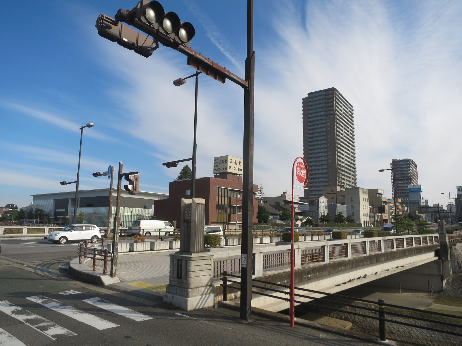 龍城橋（岡崎市康生町）